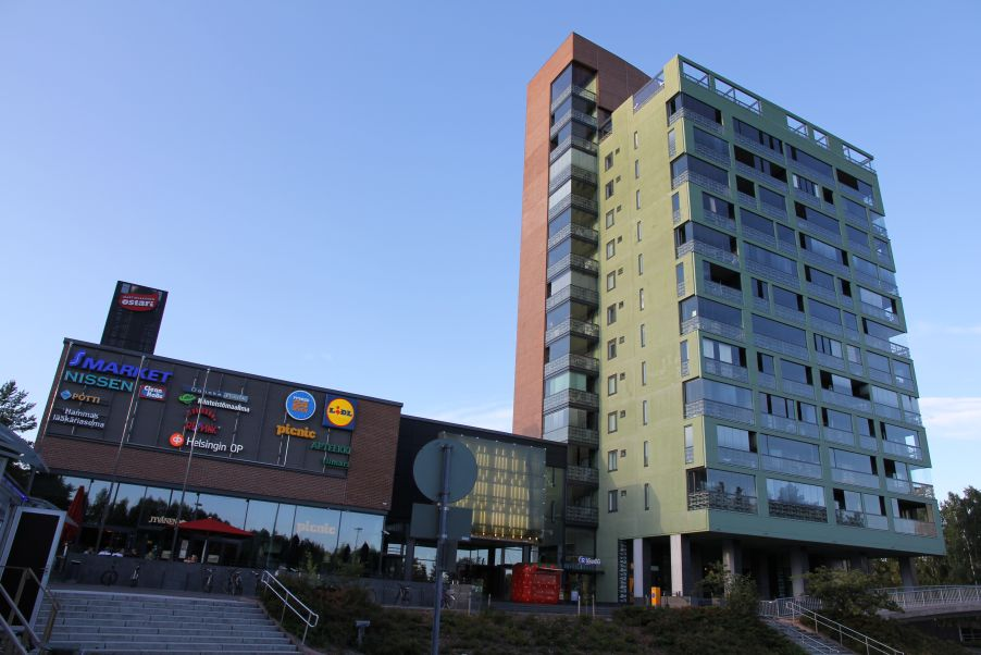 Martinlaakson ostari. Sijainti Martinlaakson rautatieaseman itäpuolella. Vantaa. Huom: Muista säilyttää viittaus kuvaajaan, mikäli käytät kuvaa.